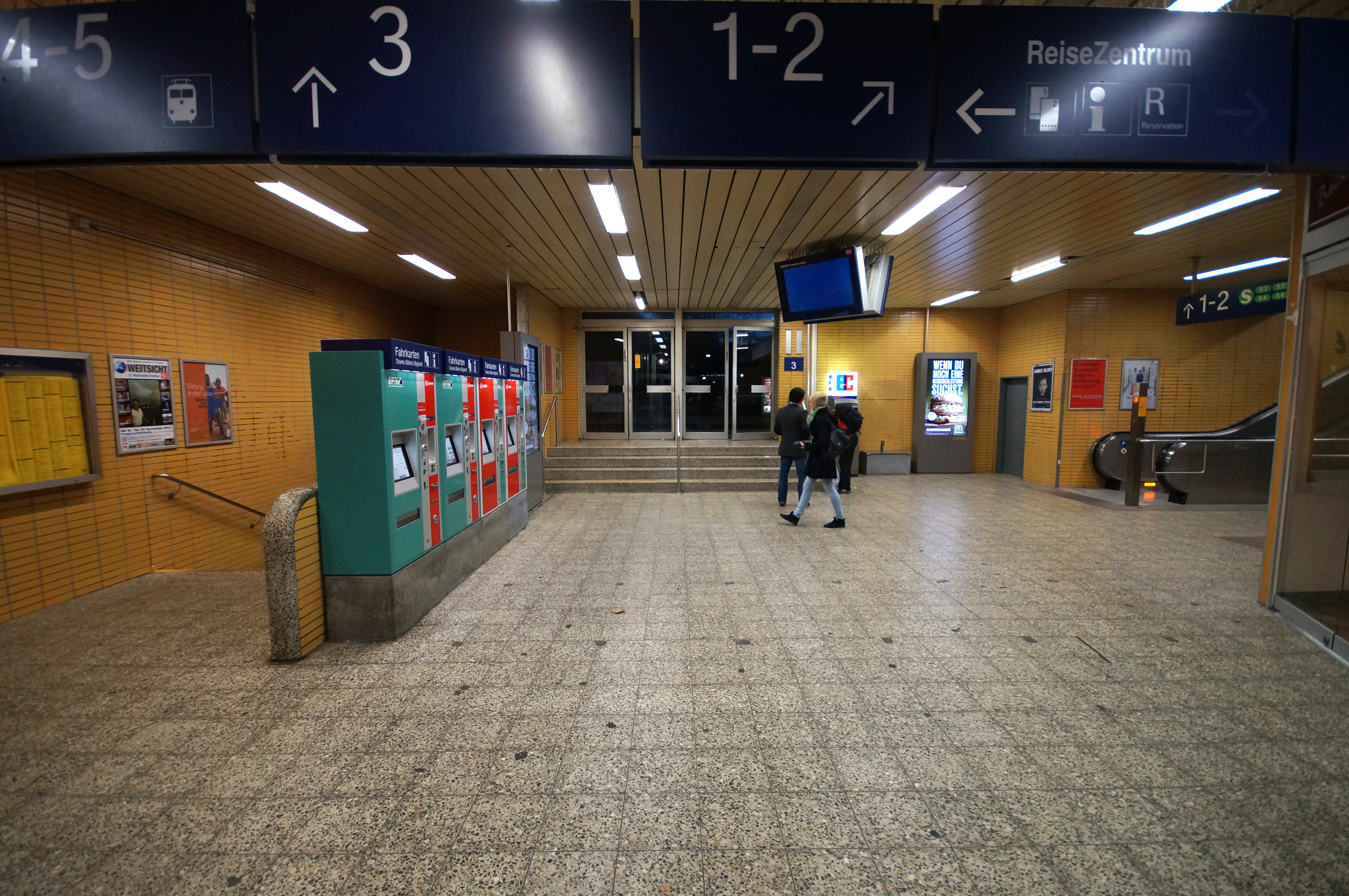 Die Haupthalle des Bahnhofs Frankfurt (Main) West